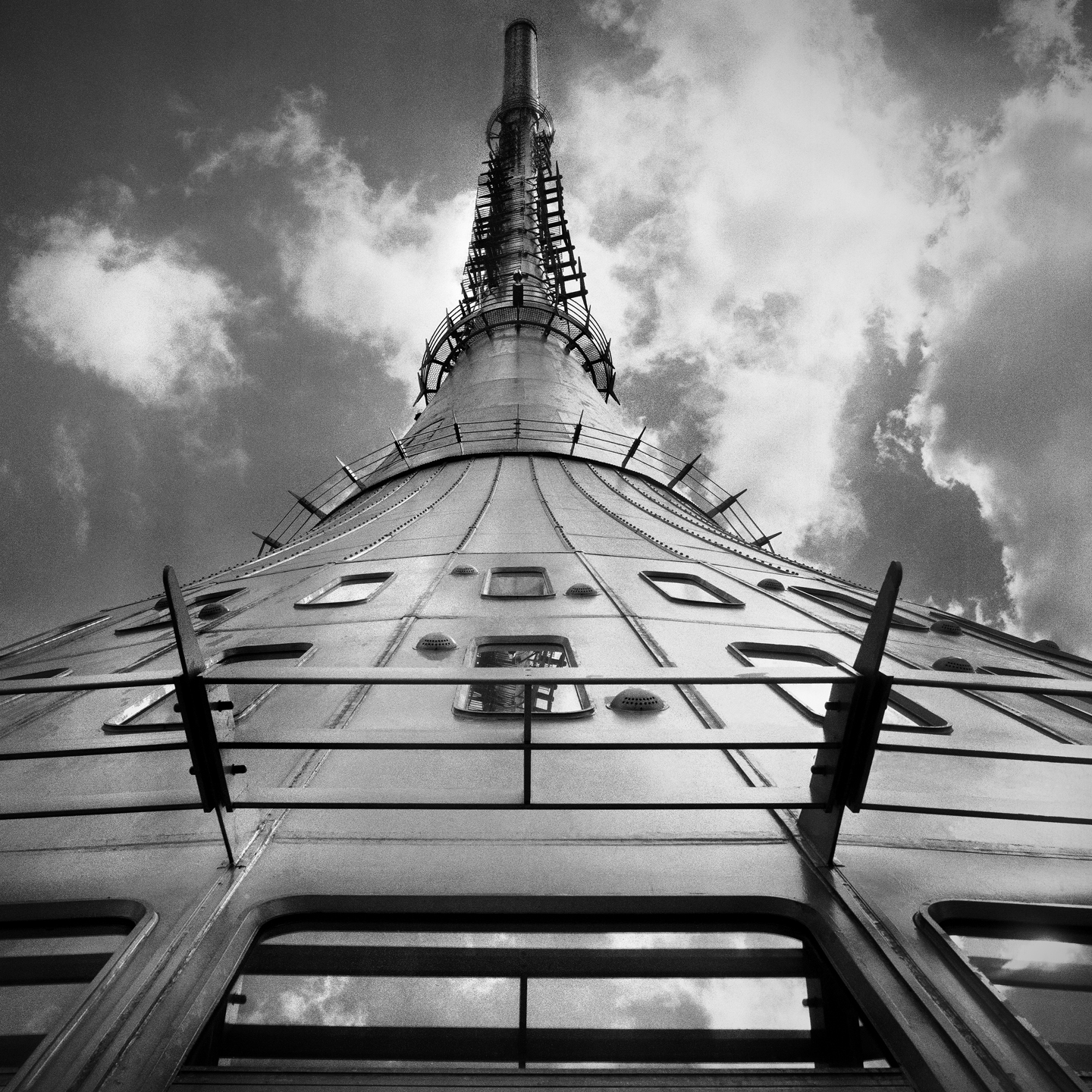 Jiří Jiroutek´s picture Cyklus: Fenomén Ještěd